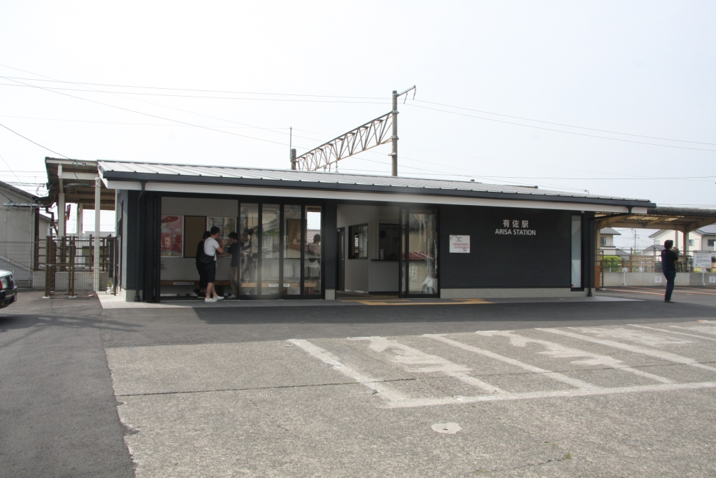 JR有佐駅